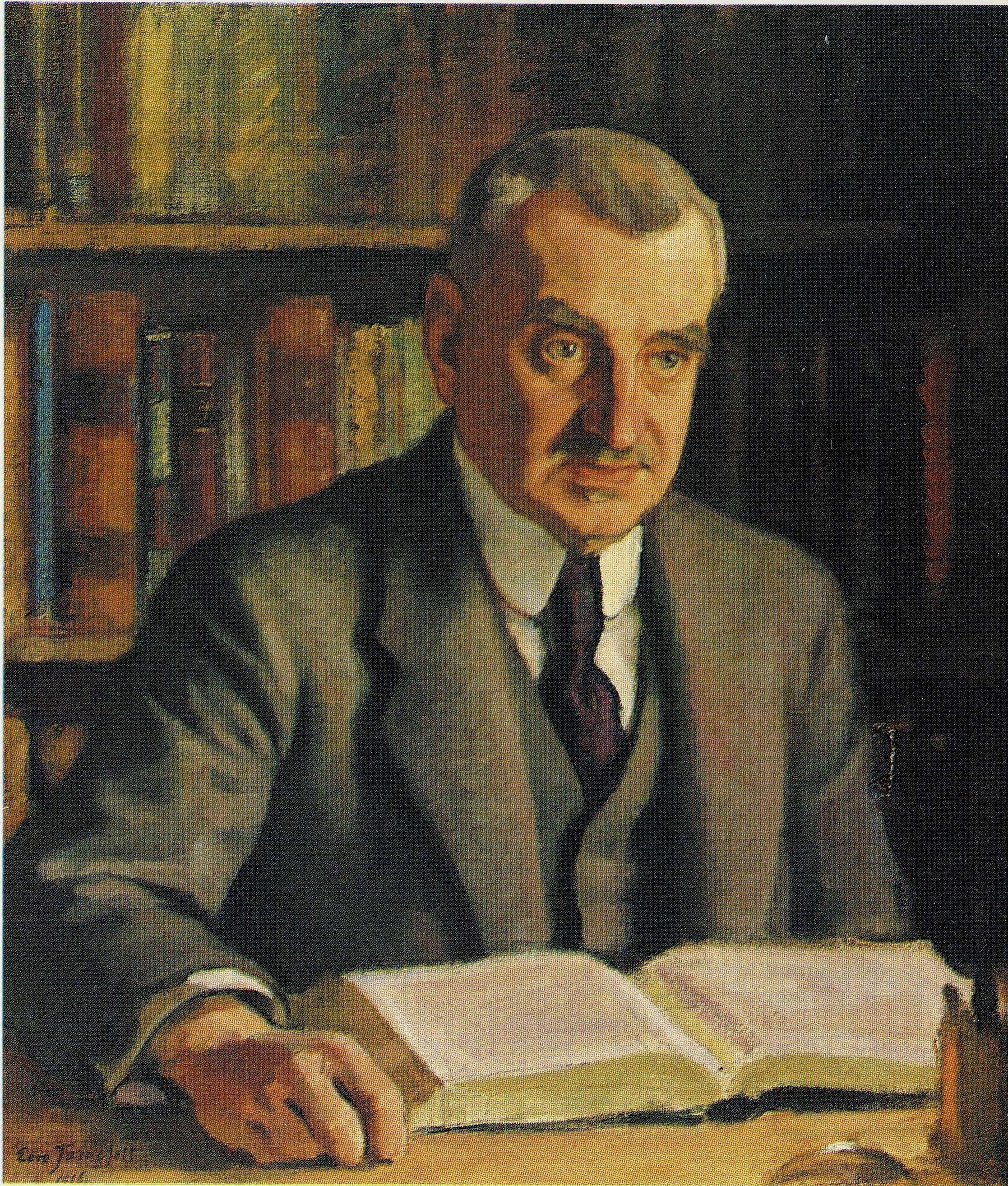 Professori Werner Söderhjelm (1859–1931), Karjalaisen osakunnan inspehtoristaan maalauttama muotokuva.